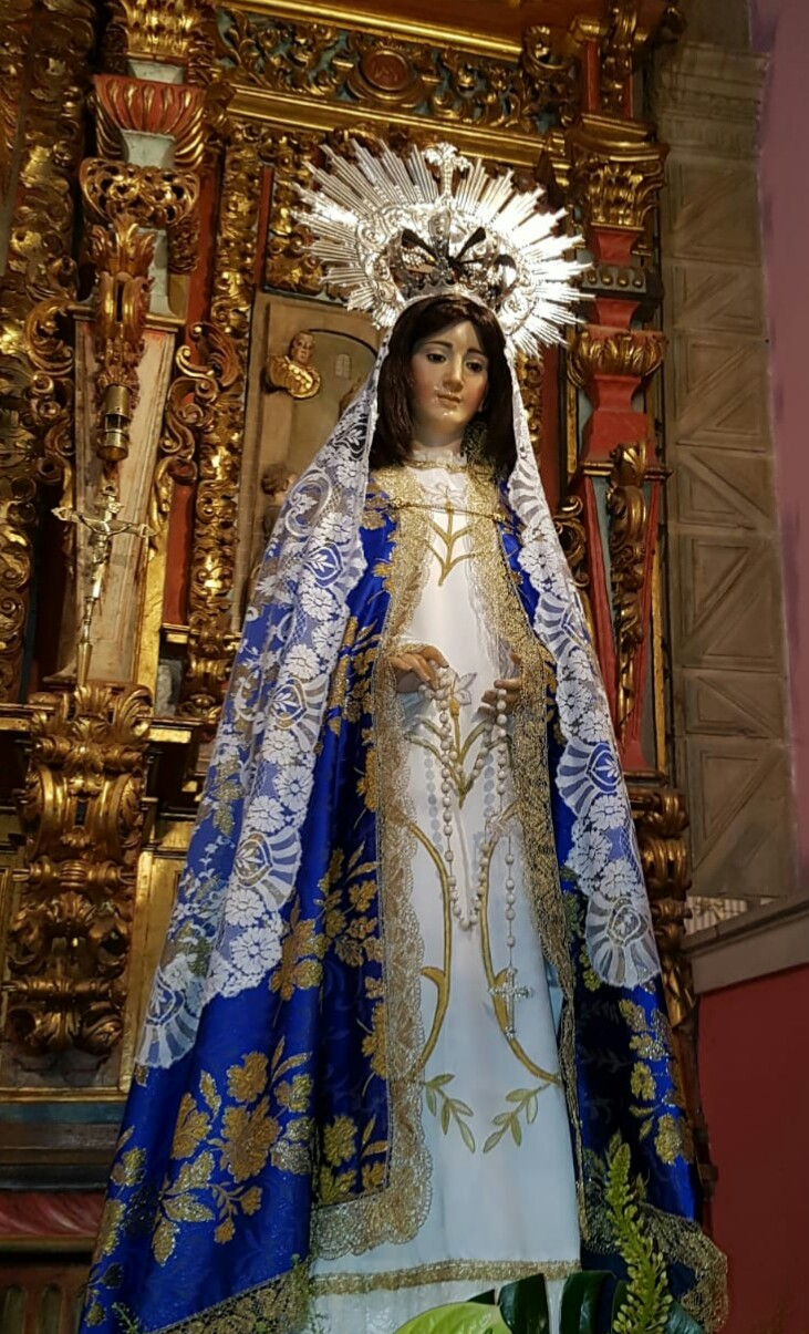 Virgen del Carbayu, patrona de Langreo (Asturias)